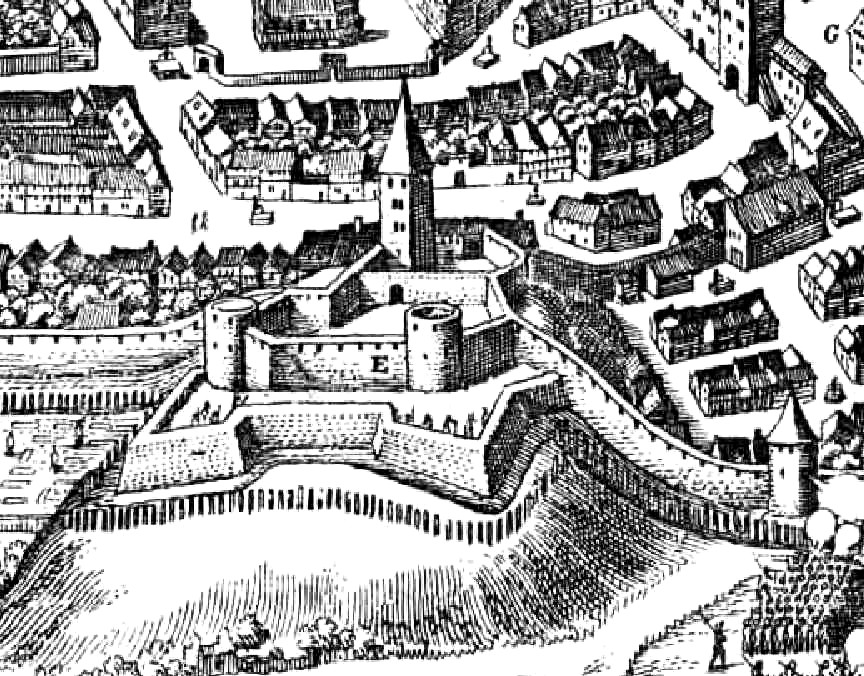 Burghalde in Kempten